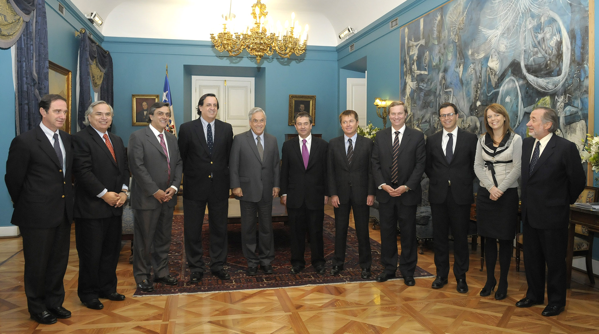 La Ministra Secretaria General de Gobierno,participa en el almuerzo de trabajo con la directiva nacional de la Unión Demócrata.Palacio de La Moneda.